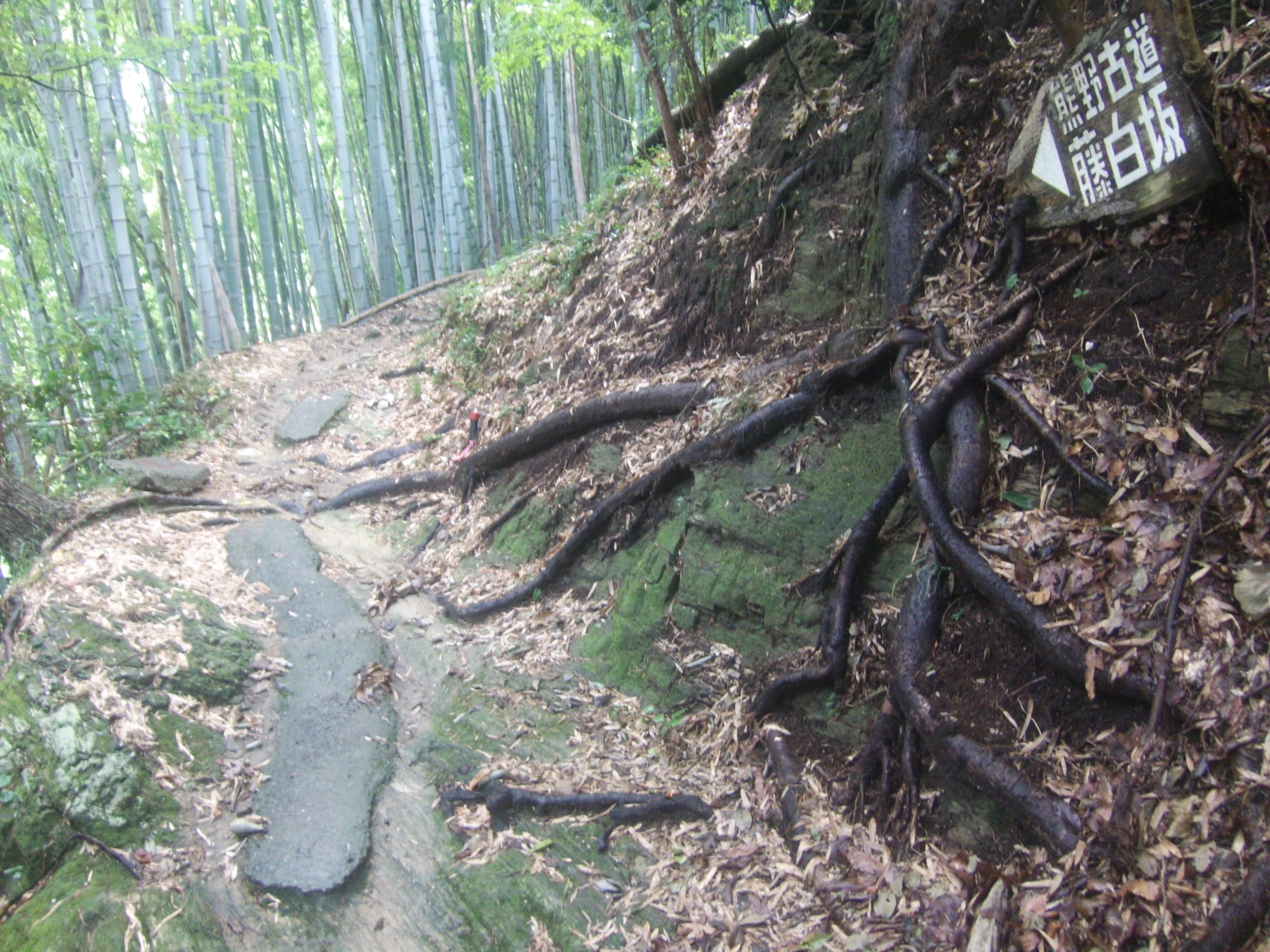 熊野古道・紀伊路の藤白坂